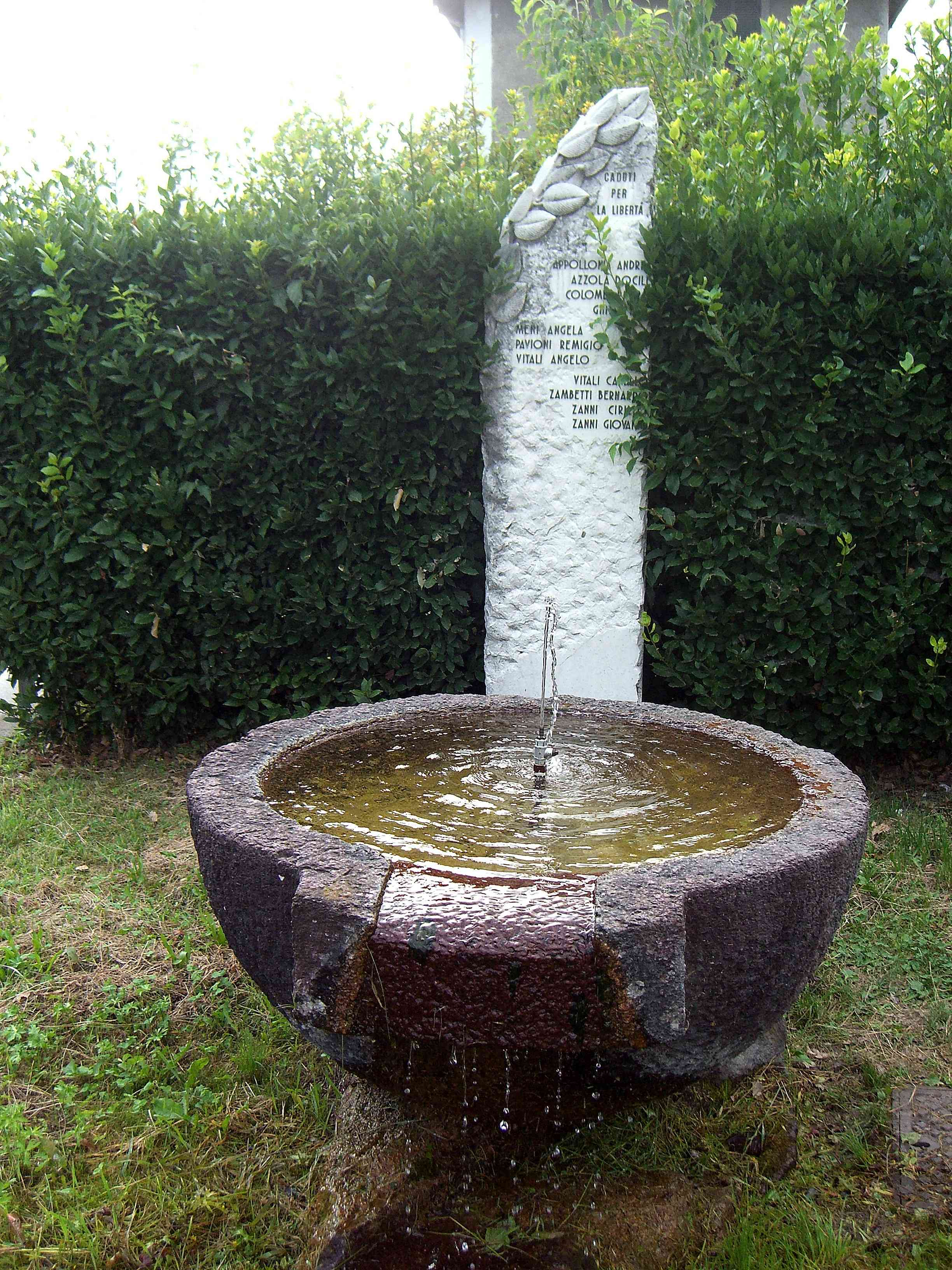 BG Endine Gaiano fontana e stele caduti per la Libertà strada Nazionale al bivio con via Martiri della Libertà che porta al centro storico di Endine Gaiano